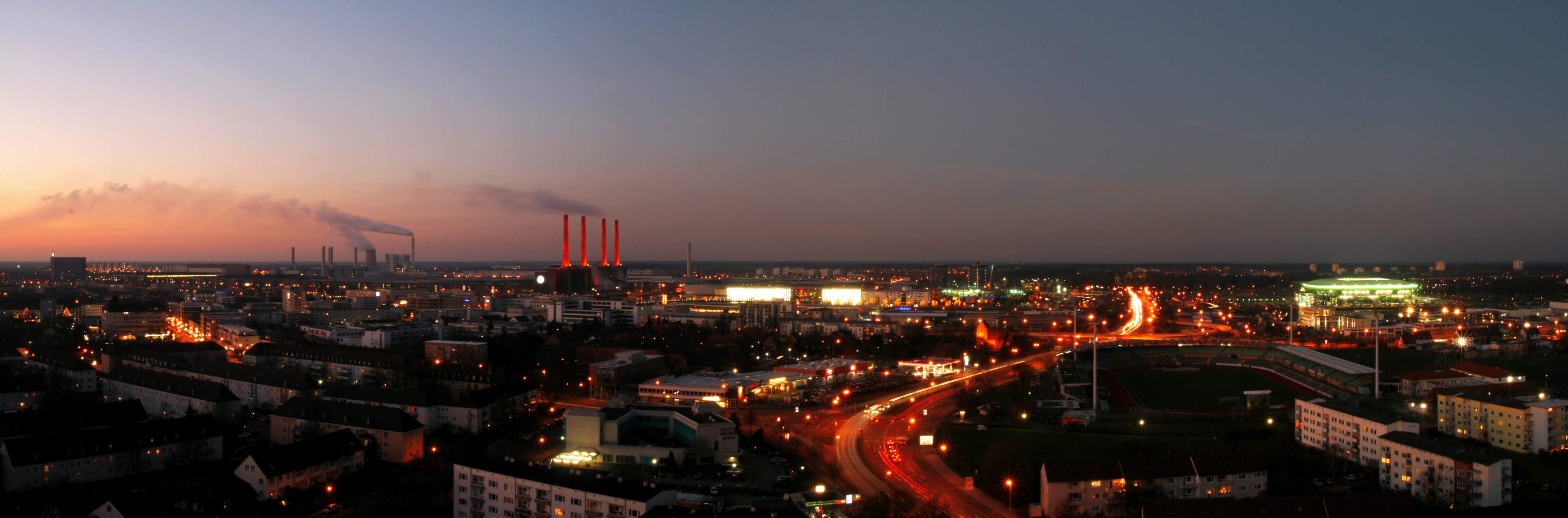 Sicht über Wolfsburg vom Schillercenter